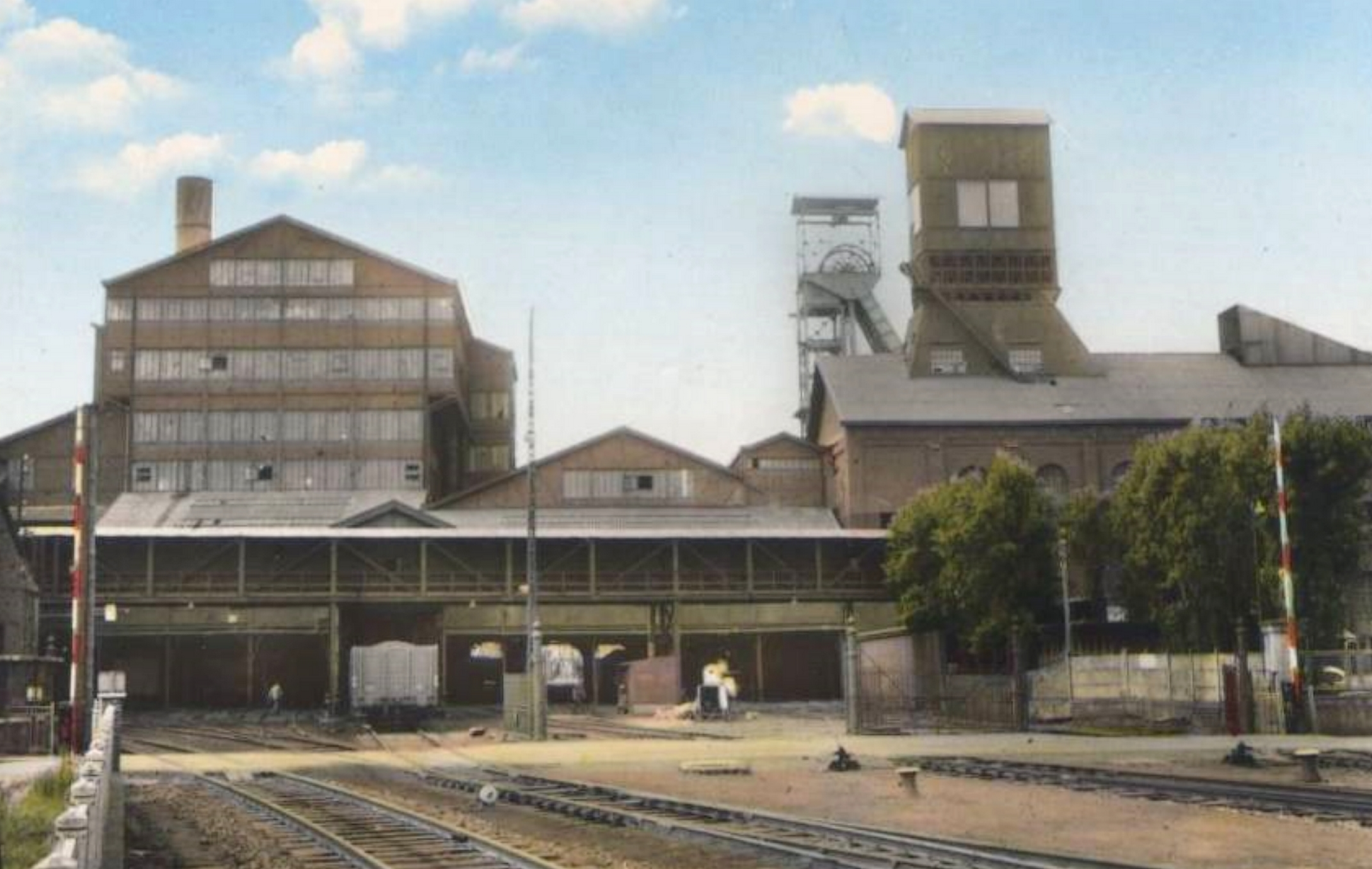 La Fosse n° 3 - 3 bis - 3 ter de la Compagnie des mines de Bruay était un charbonnage constitué de trois puits situé à Bruay-la-Buissière, Pas-de-Calais, Nord-Pas-de-Calais, France.